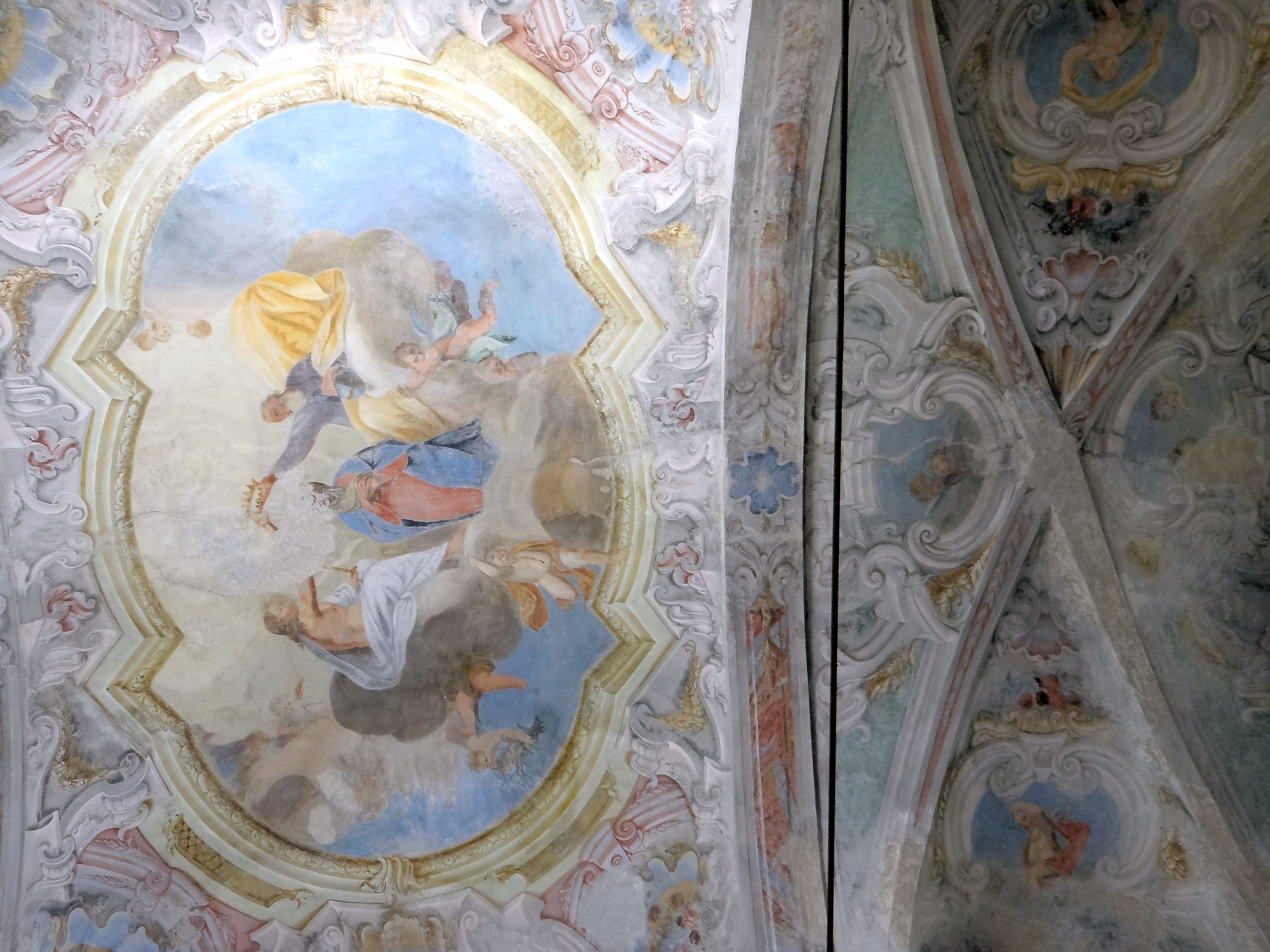 La Brigue - Chapelle Notre-Dame-des-Fontaines - Décor de la voûte de la nef